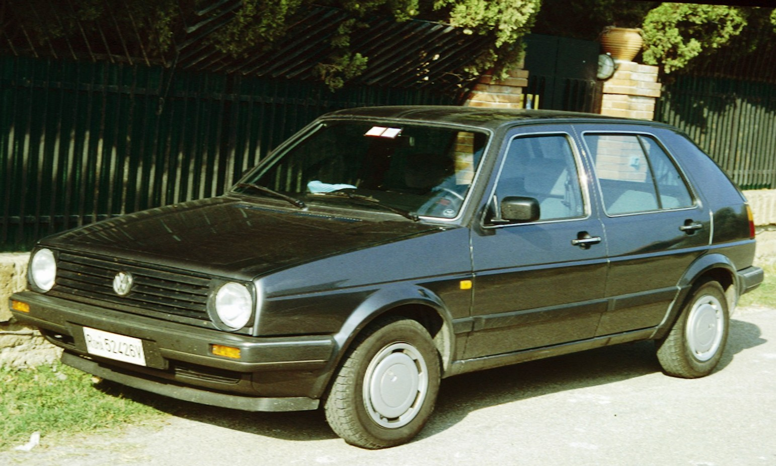 Volkswagen Golf 5 door in Umbria 1990